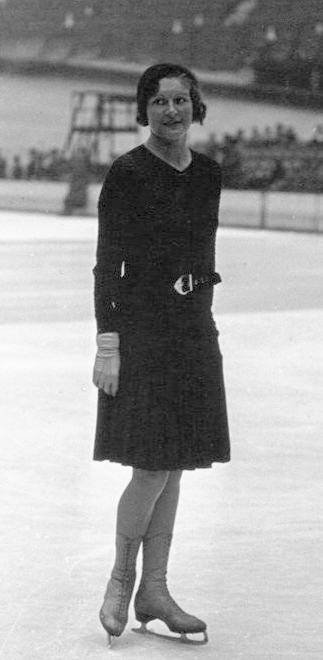 Championnat d'Europe de patinage : Mlle Lignie (Belgique) : [photographie de presse] / Agence Mondial